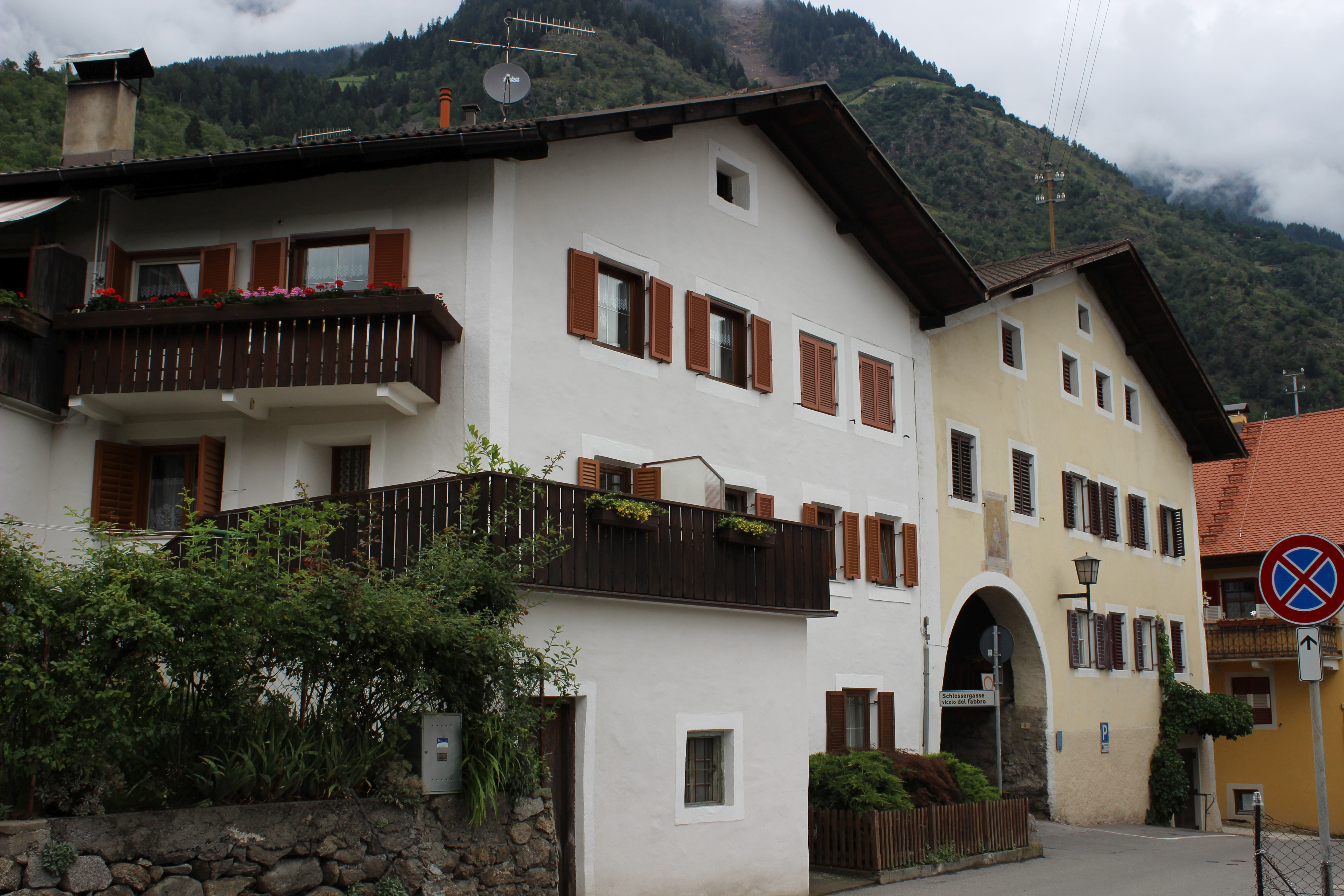 Montelbon in Partschins (Südtirol)